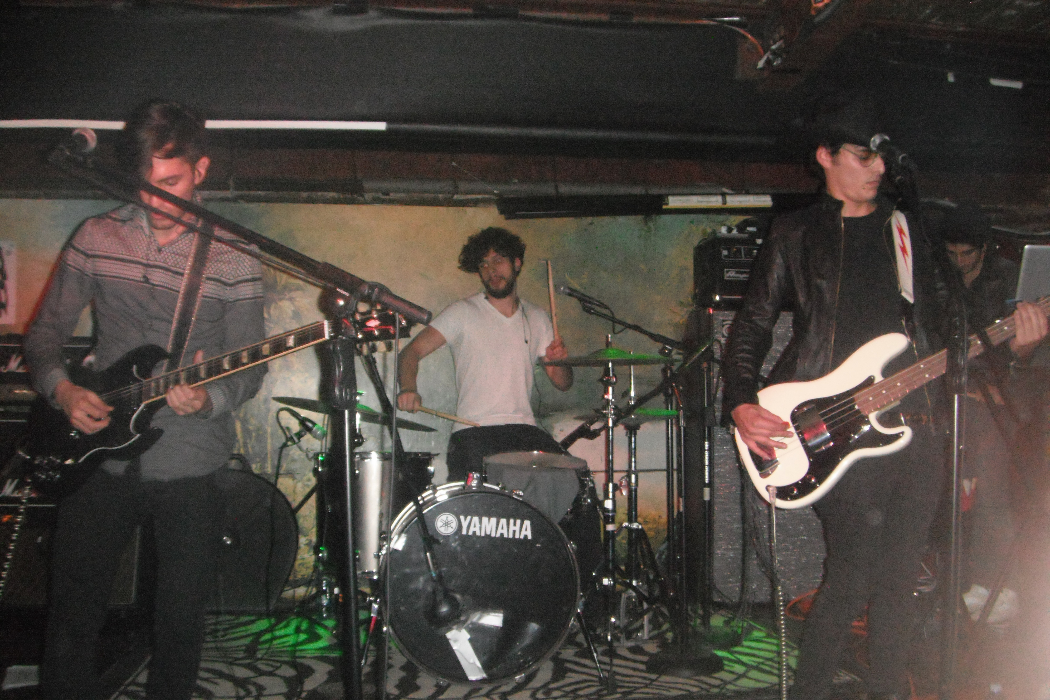 Tocada del 5 de noviembre del 2013